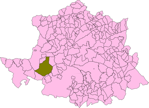 Brozas